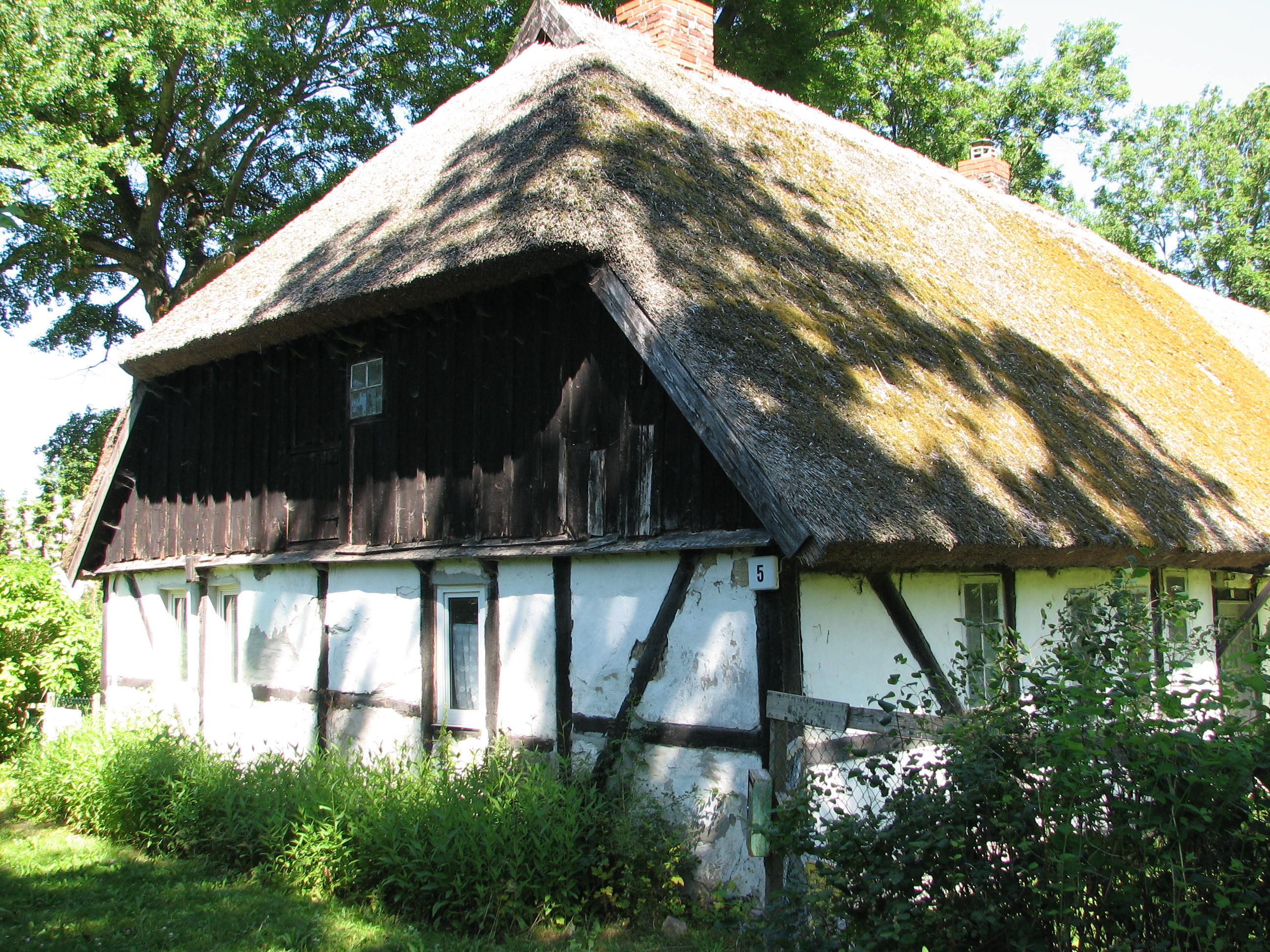 denkmalgeschütztes Bauernhaus